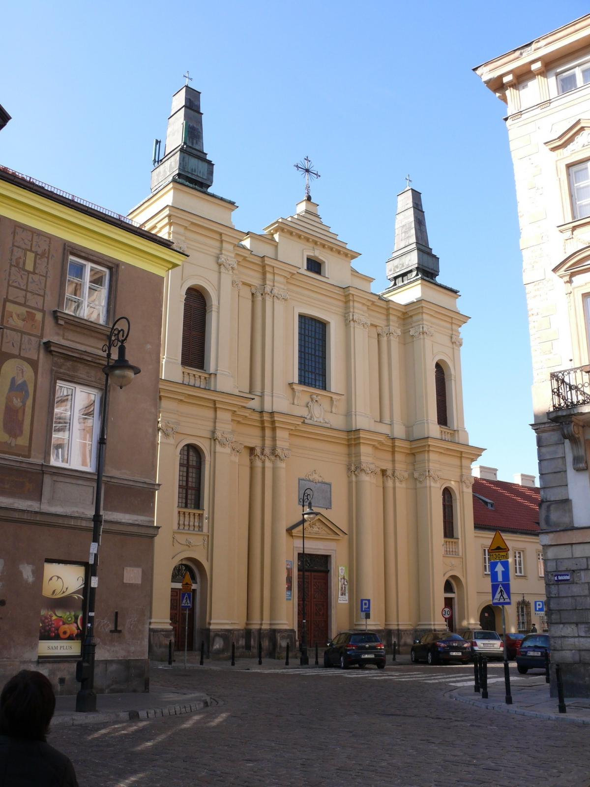 Zakroczymska 1, 00-225 Warszawa